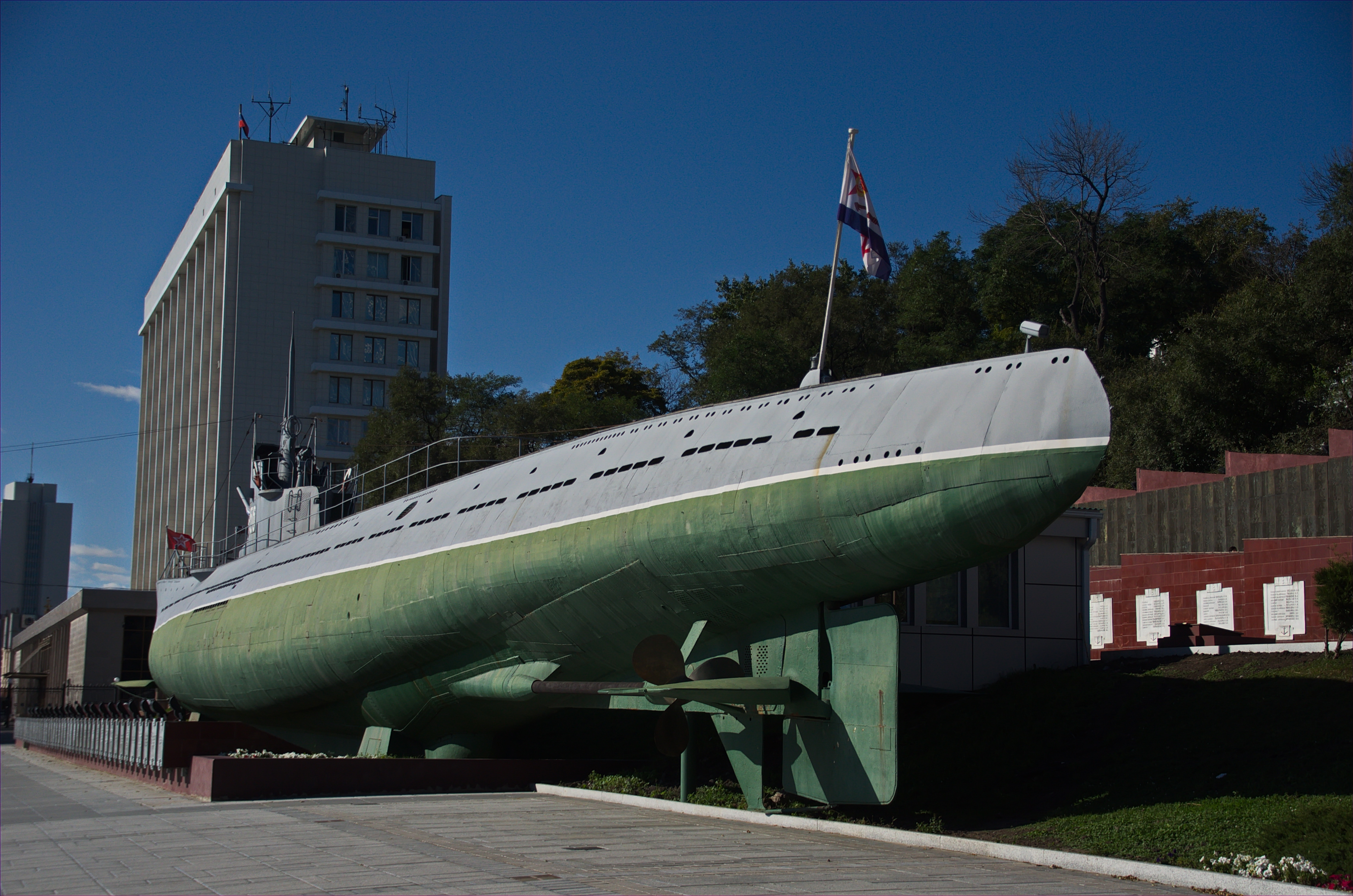 056 - Wladiwostok 2015